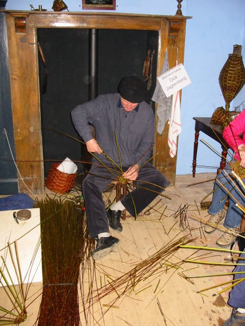 Mandenvlechter aan het werk. Fotograaf: J.A.C. de Kroon. Gemaakt op 27-12-2005 in het Openluchtmuseum te Arnhem.